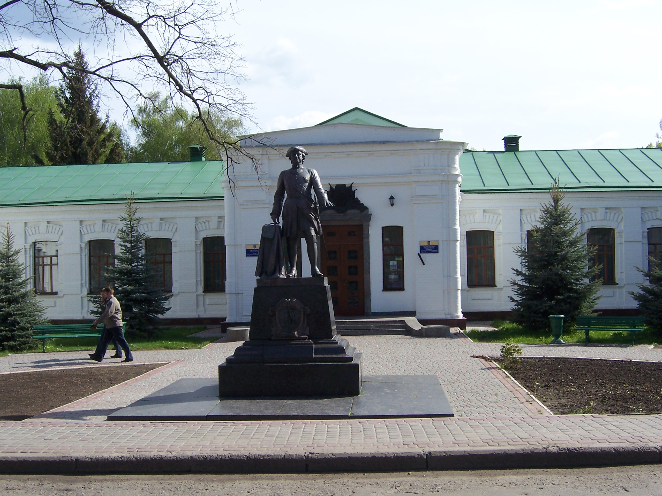 Музей-заповедник "Поле Полтавской битвы", Яковцы, Полтава, Украина